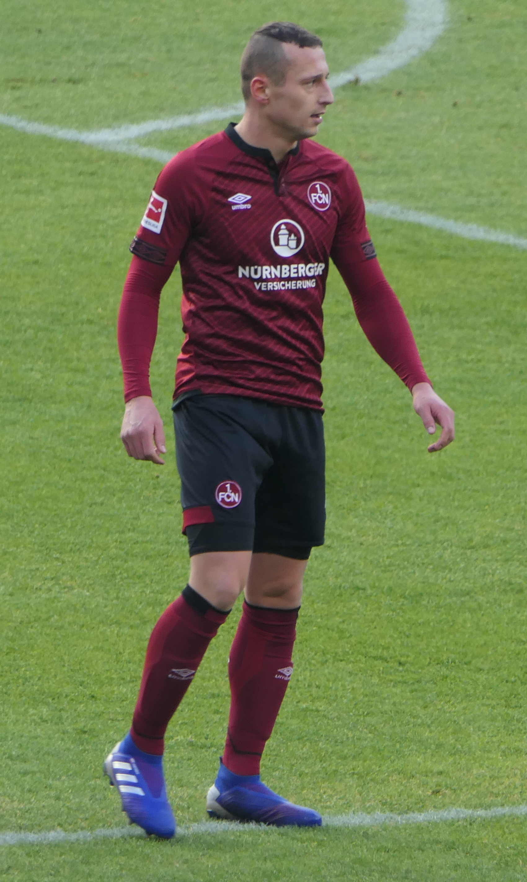 Der Fussballprofi Adam Zrelak vom 1.FC Nürnberg beim Heimspiel gegen Werder Bremen am 02.02.2019.